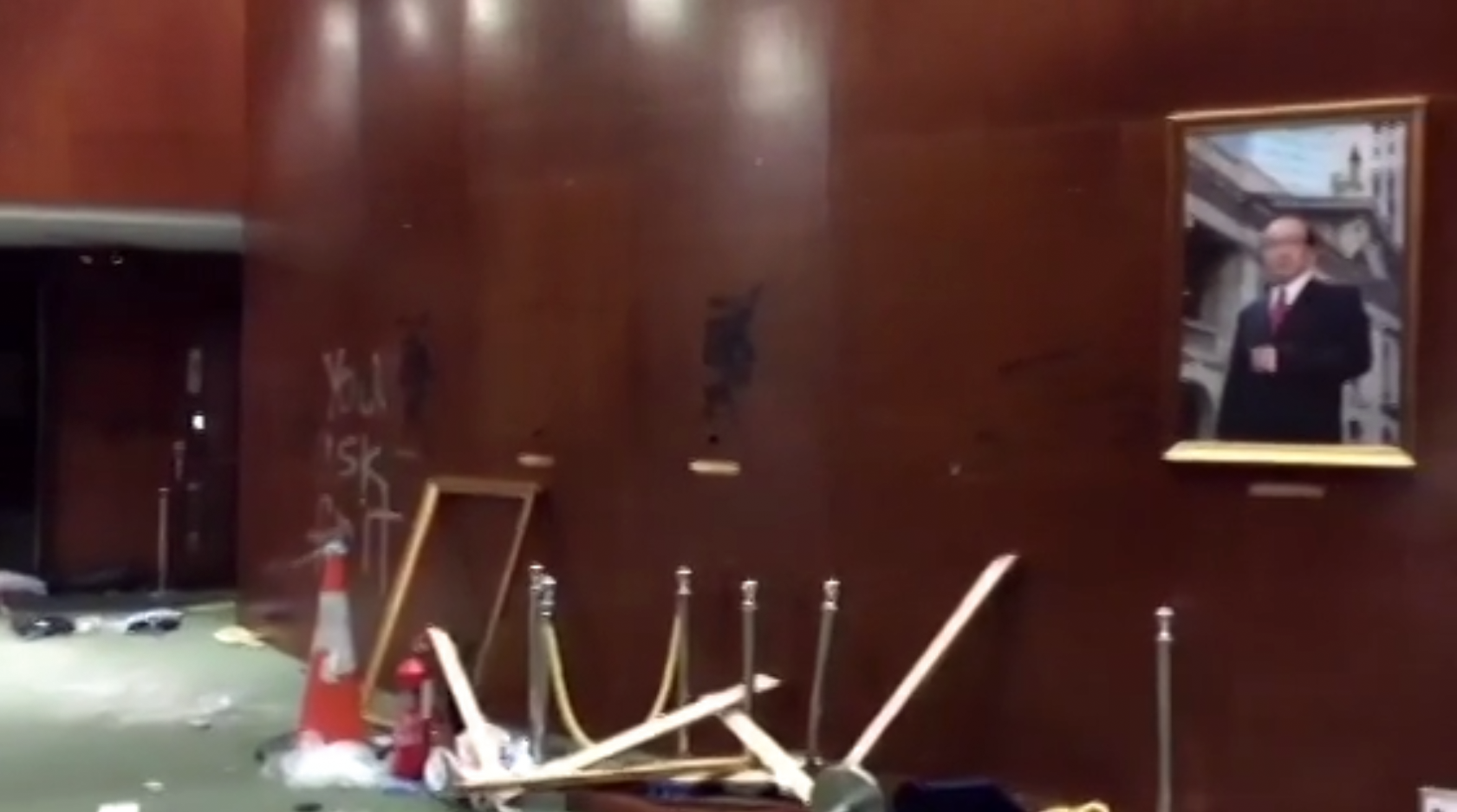 特區政府邀請中外媒體進入刑偵結束後的立法會暴力事件現場參觀拍照